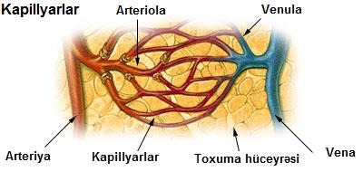 Kapillyar torunun sxemi